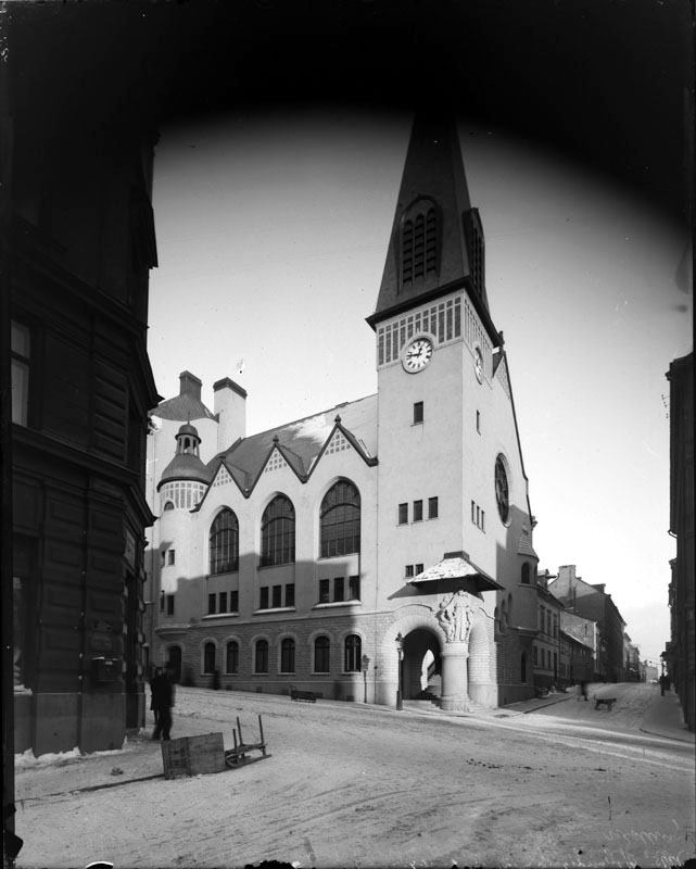 ankt Peterskyrkan, Upplandsgatan 12, i hörnet av Kammakargatan vintertid Foto Nyckelord Plats: Kvarteret VINGRÅEN. Kammakargatan. Upplandsgatan 12. Norrmalm. Tid: 1902 Ämne: Kyrkor. Referenser Upphov: Okänd. Tid: 1902 Beteckning: Fotonummer C 1788